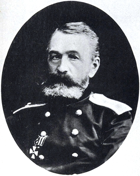 Барсов, Александр Андреевич. Данное изображение было использовано в статье «Барсов, Александр Андреевич» опубликованной в четвёртом томе «Военной энциклопедии», который был издан книгоиздательским товариществом Ивана Дмитриевича Сытина в 1911 году в столице Российской империи городе Санкт-Петербурге.